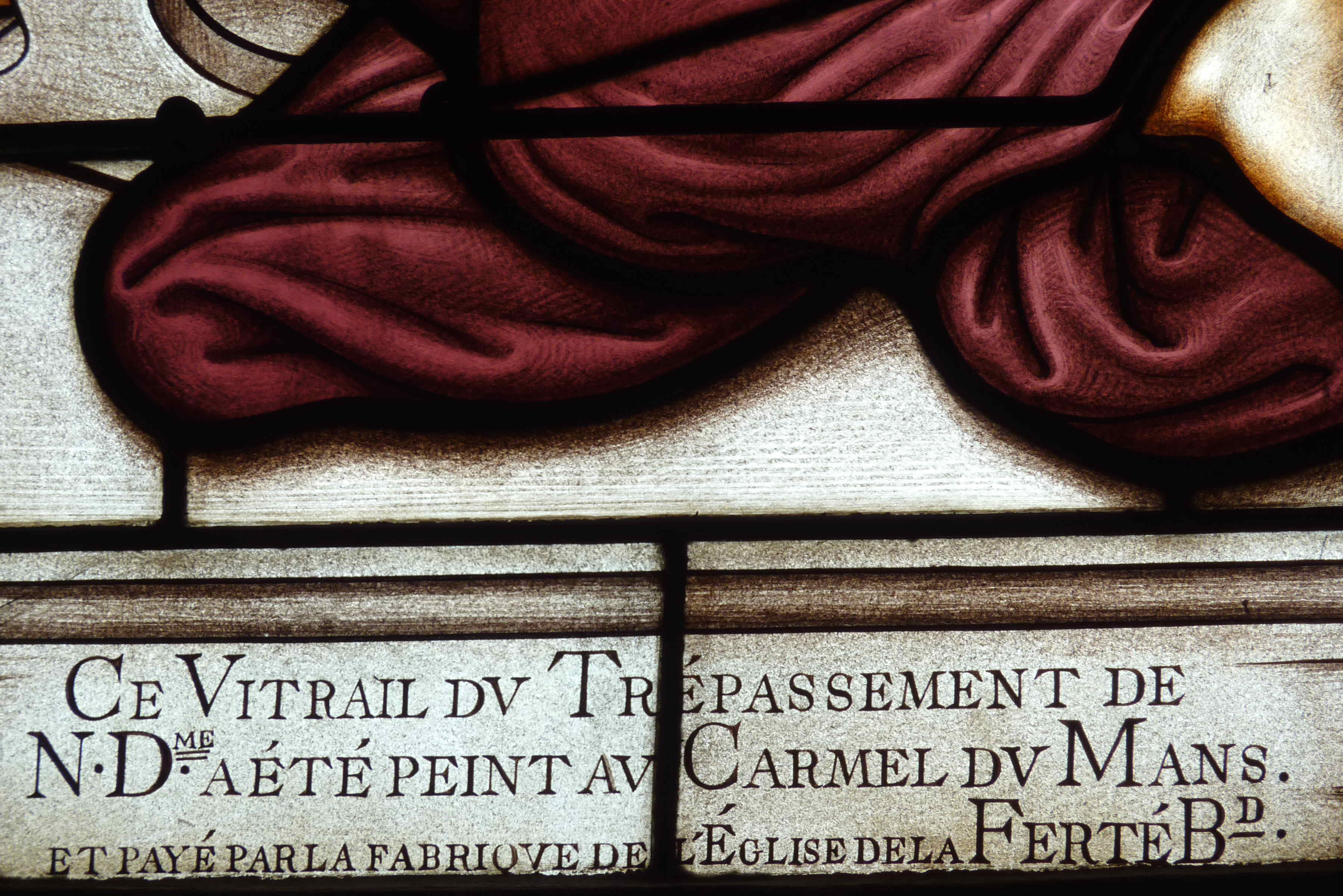 Katholische Pfarrkirche Notre-Dame-des-Marais in La Ferté-Bernard im Département Sarthe (Pays de la Loire/Frankreich), Bleiglasfenster (baie 3), mit Fragmenten aus der Zeit um 1533 von François Delalande im Maßwerk und im oberen Teil der Lanzetten, Lanzetten von 1873, mit Signatur: E. RATHOUIS, aus der Glasmalereiwerkstatt der Karmeliten von Le Mans (Carmel du Mans), Darstellung: Marientod; Ausschnitt: Inschrift unten